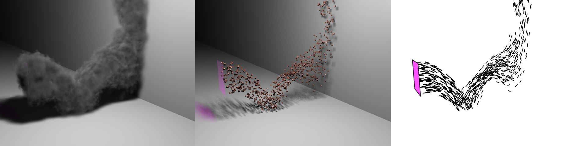 Stellt Verschiedene Anwendungen von Partikelsystemen bei 3D-Programmen dar